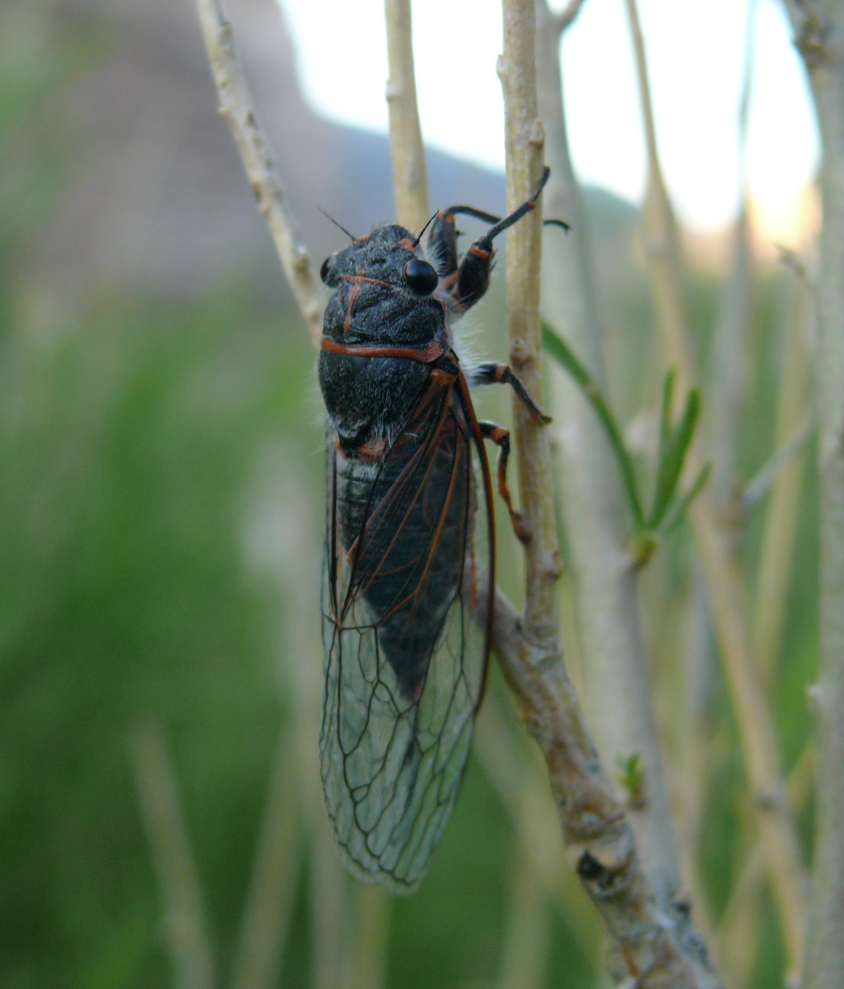 Platypedia putnami, Family: Cicadas, ID Confidence: 80